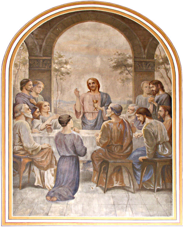 «Апошняя Вячэра». Сярэдзіна ХІХ ст., Фрэска ў касцёле вёскі Індура Гродзенскага р-на